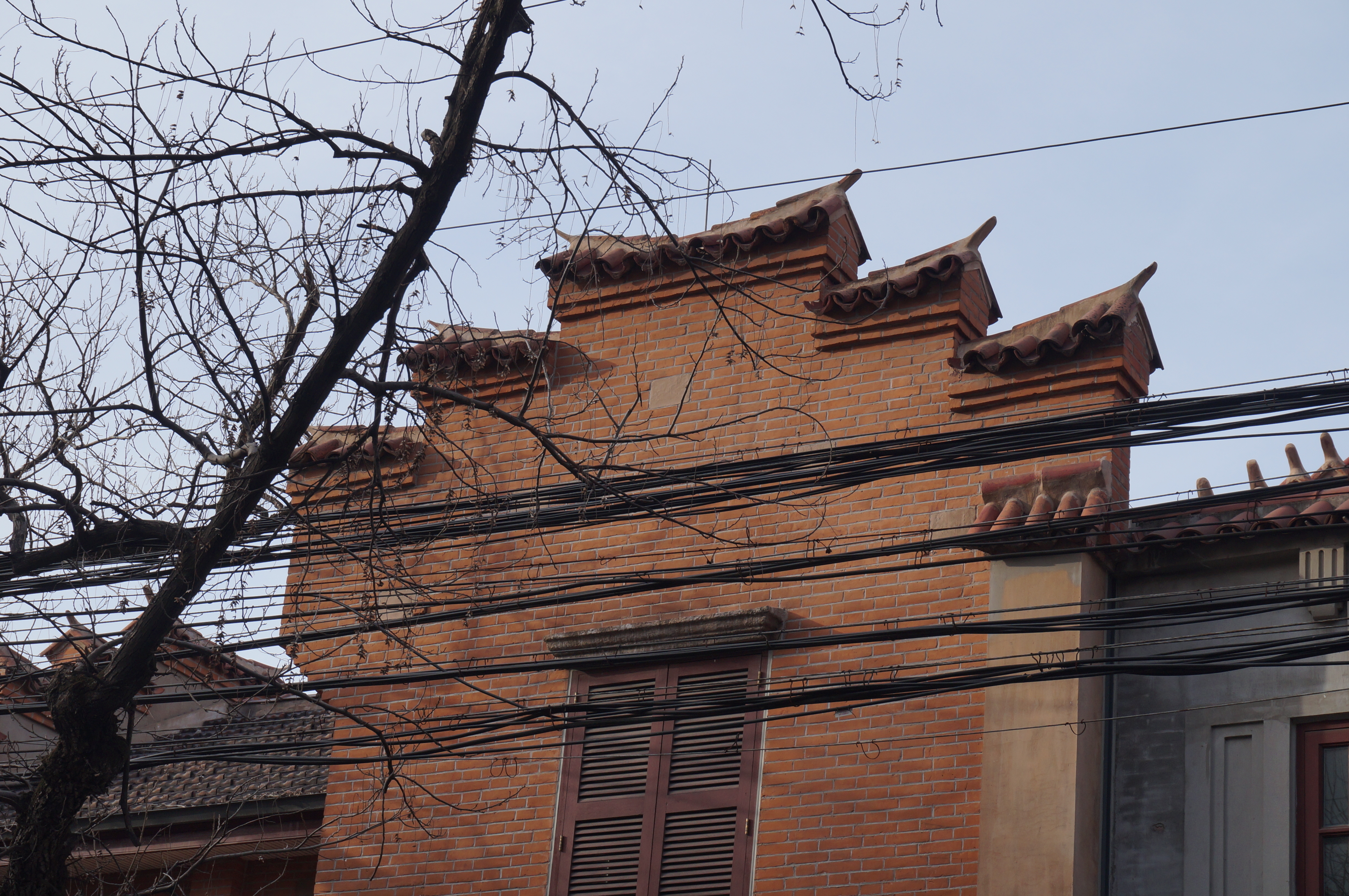 建业里的山墙